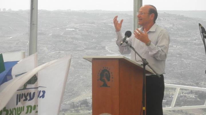 בטקס חנוכת מרכז המבקרים לזכרו של הארכיאולוג פרופסור אהוד נצר ז"ל, באתר ההרודיון